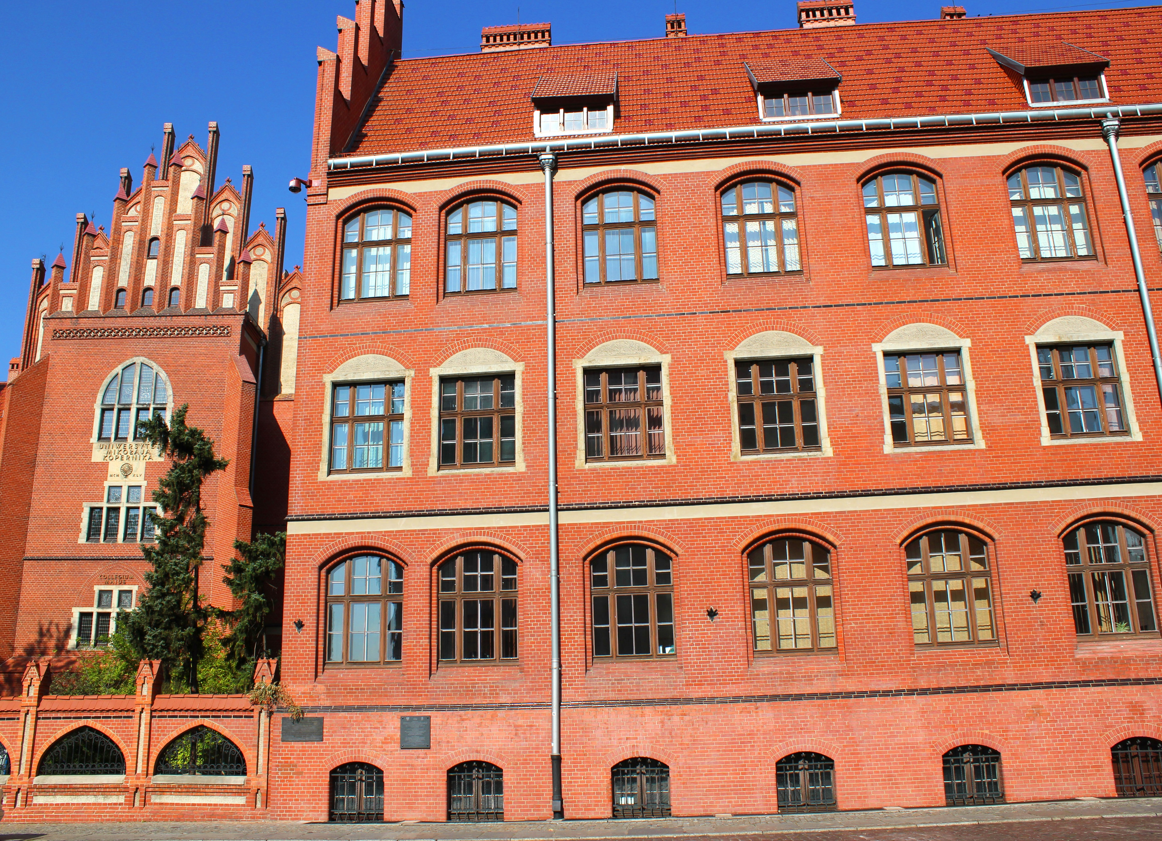 Szkoła Przemysłowa, ob. Collegium Maius UMK, 1907; ogrodzenie, mur/met Toruń, ul. Fosa Staromiejska 3, miasto Toruń